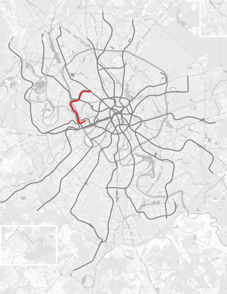 Большая кольцевая линия Московского метрополитена